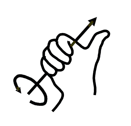 Rechte-Daumen-Regel